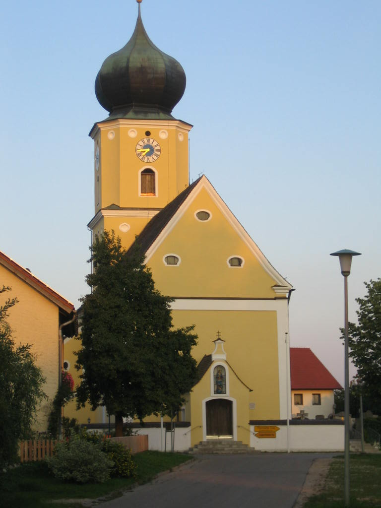 Pfarrkirche Mariä Himmelfahrt in Eutenhofen